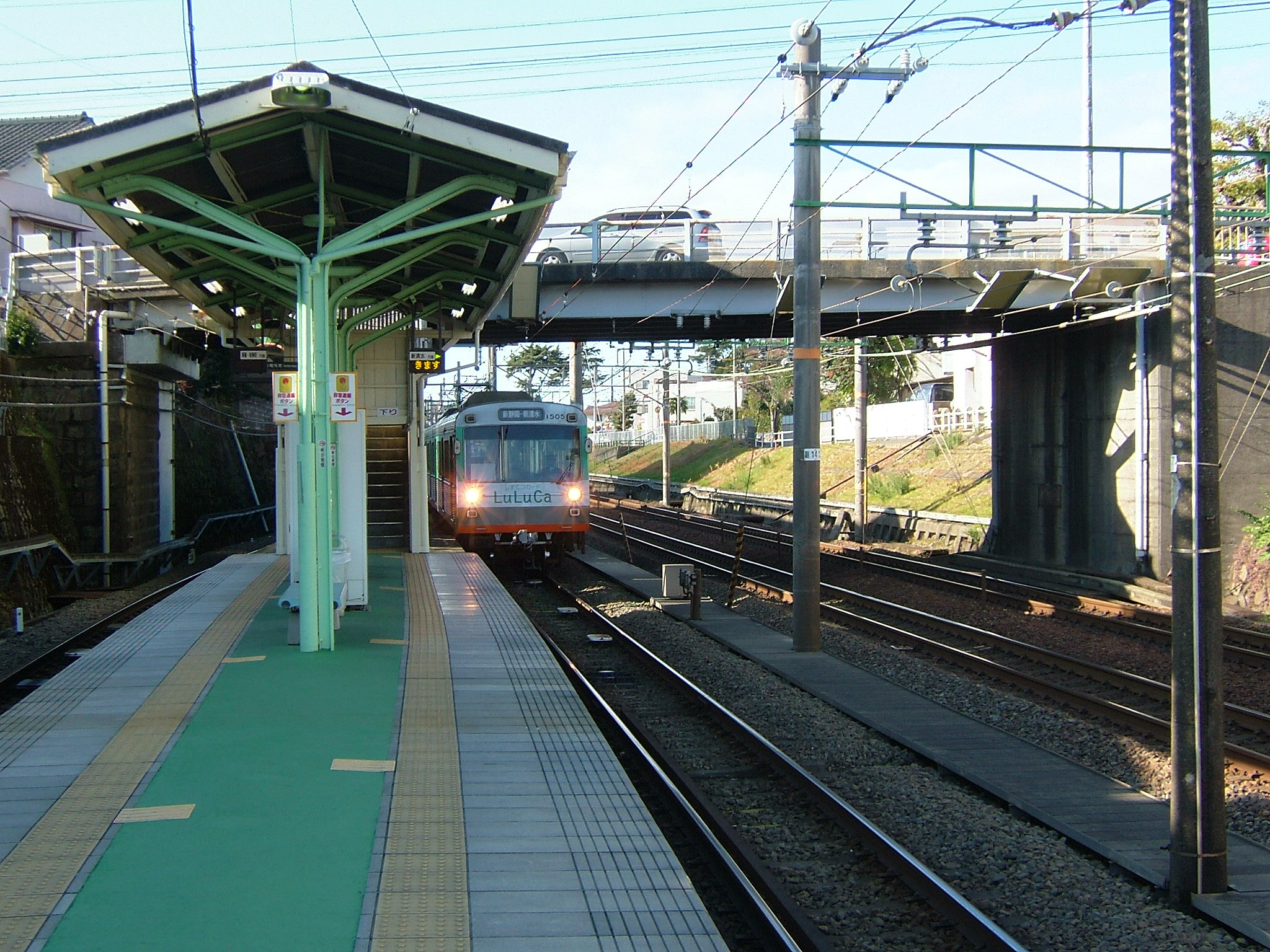 静鉄入江岡駅プラットホーム